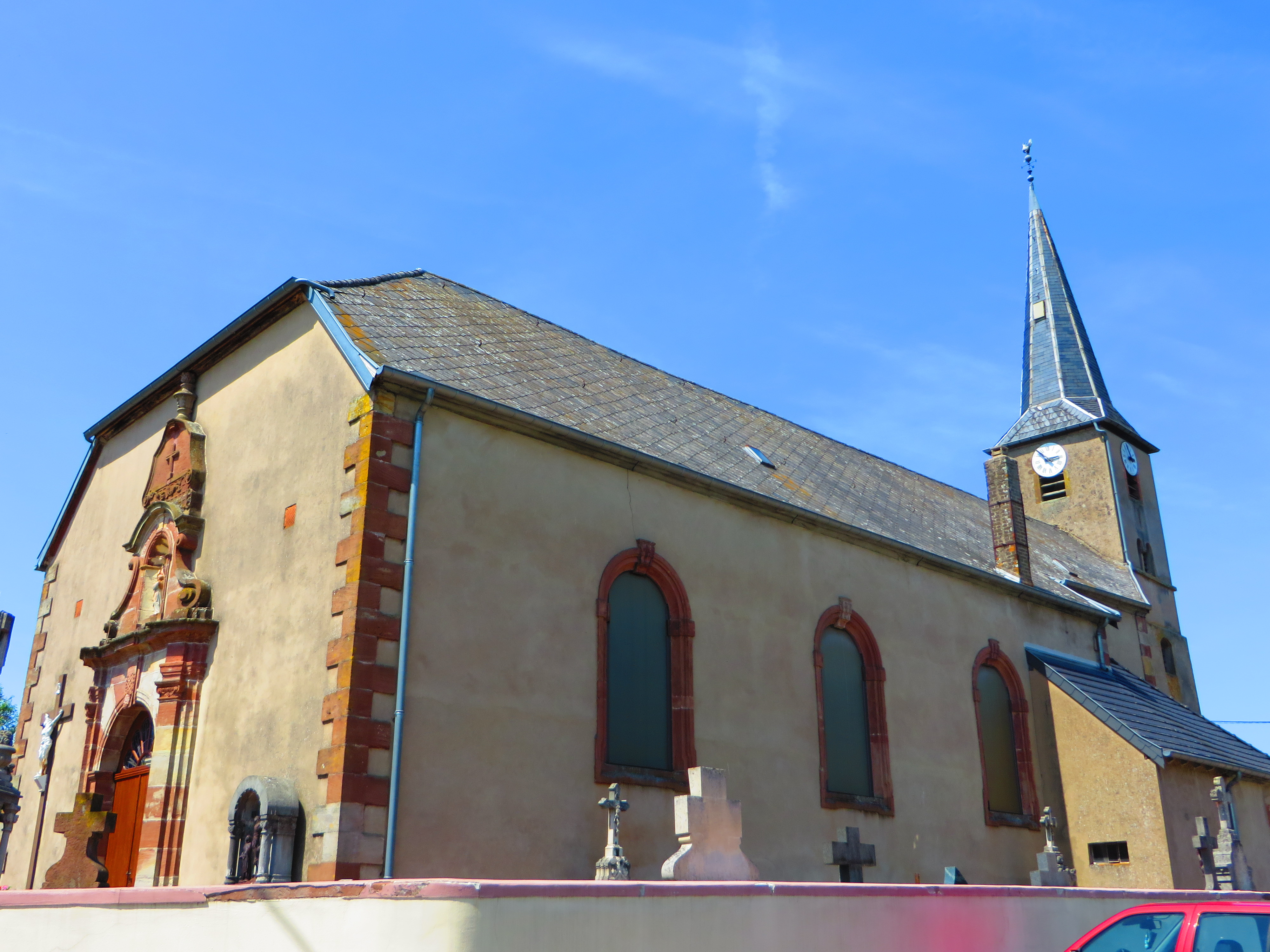 Neunkirchen Bouzonville eglise